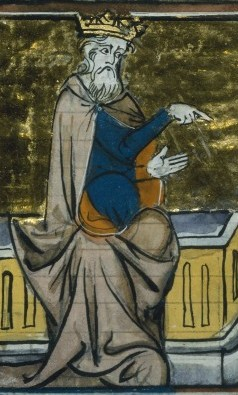 Baudouin IX de Flandre